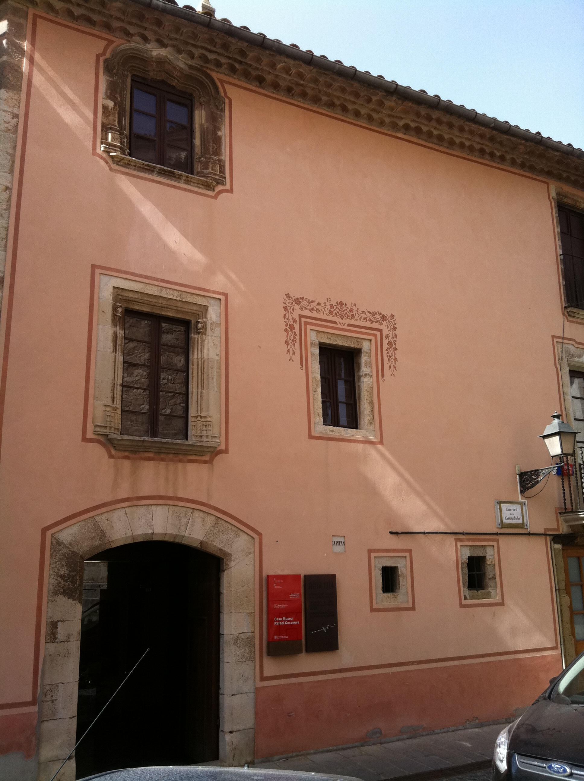 Casa Museu Rafael Casanova